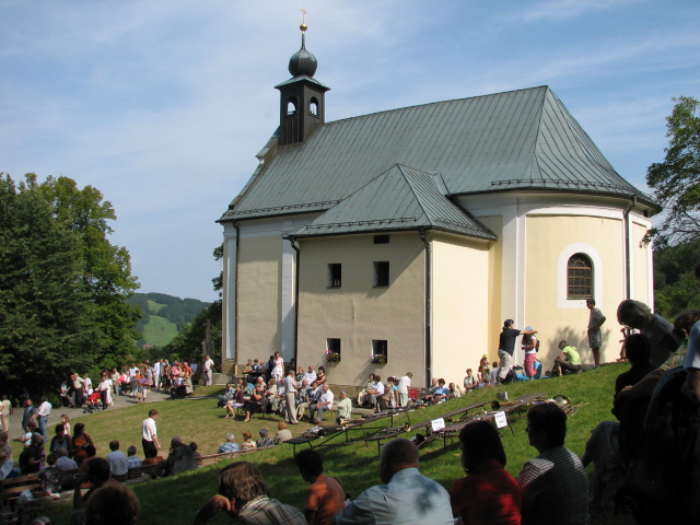 Poutní kostel Malenisko - autor Vojtěch Slovák